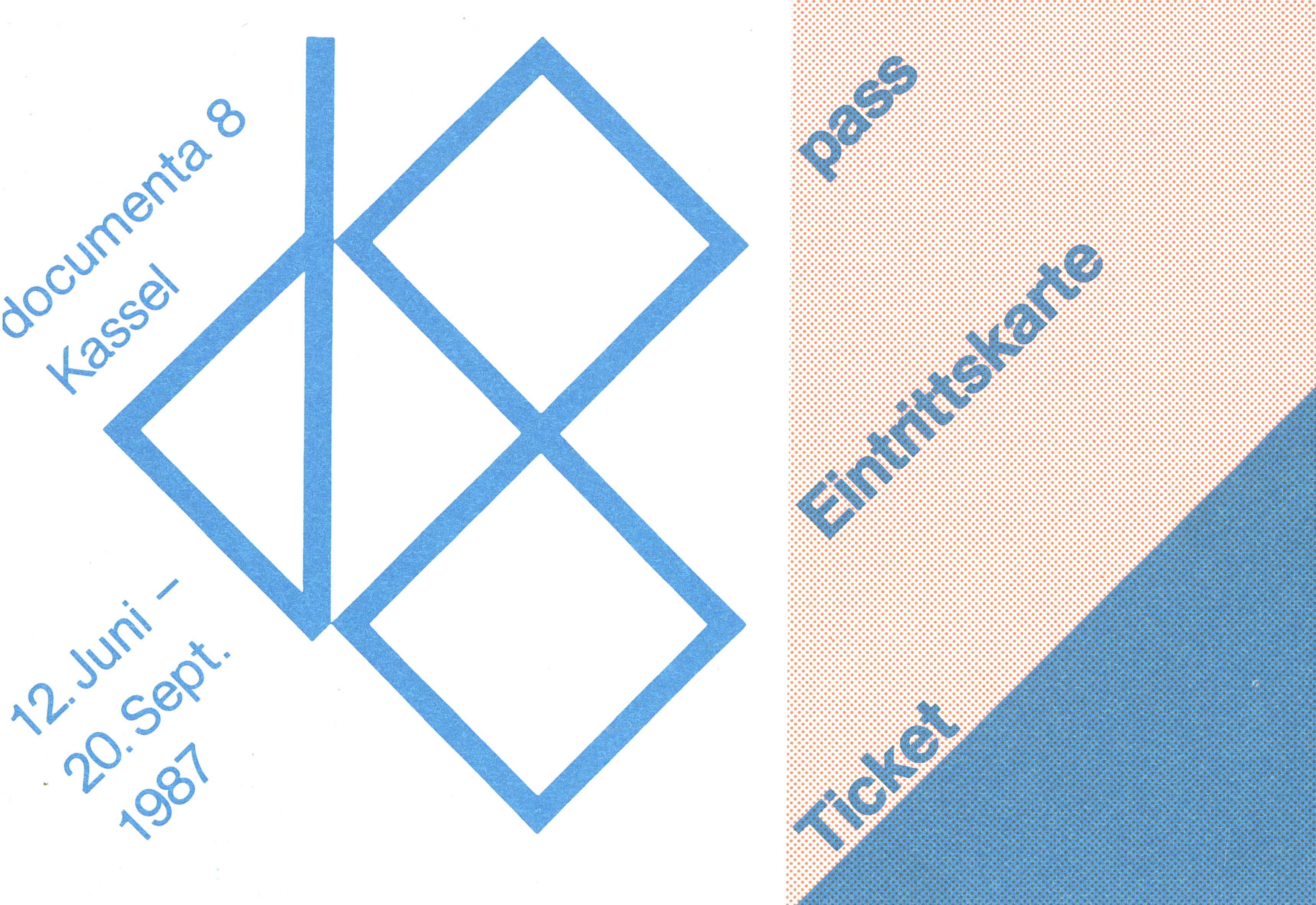 Foto des Tickets / Eintrittskarte der documenta 8